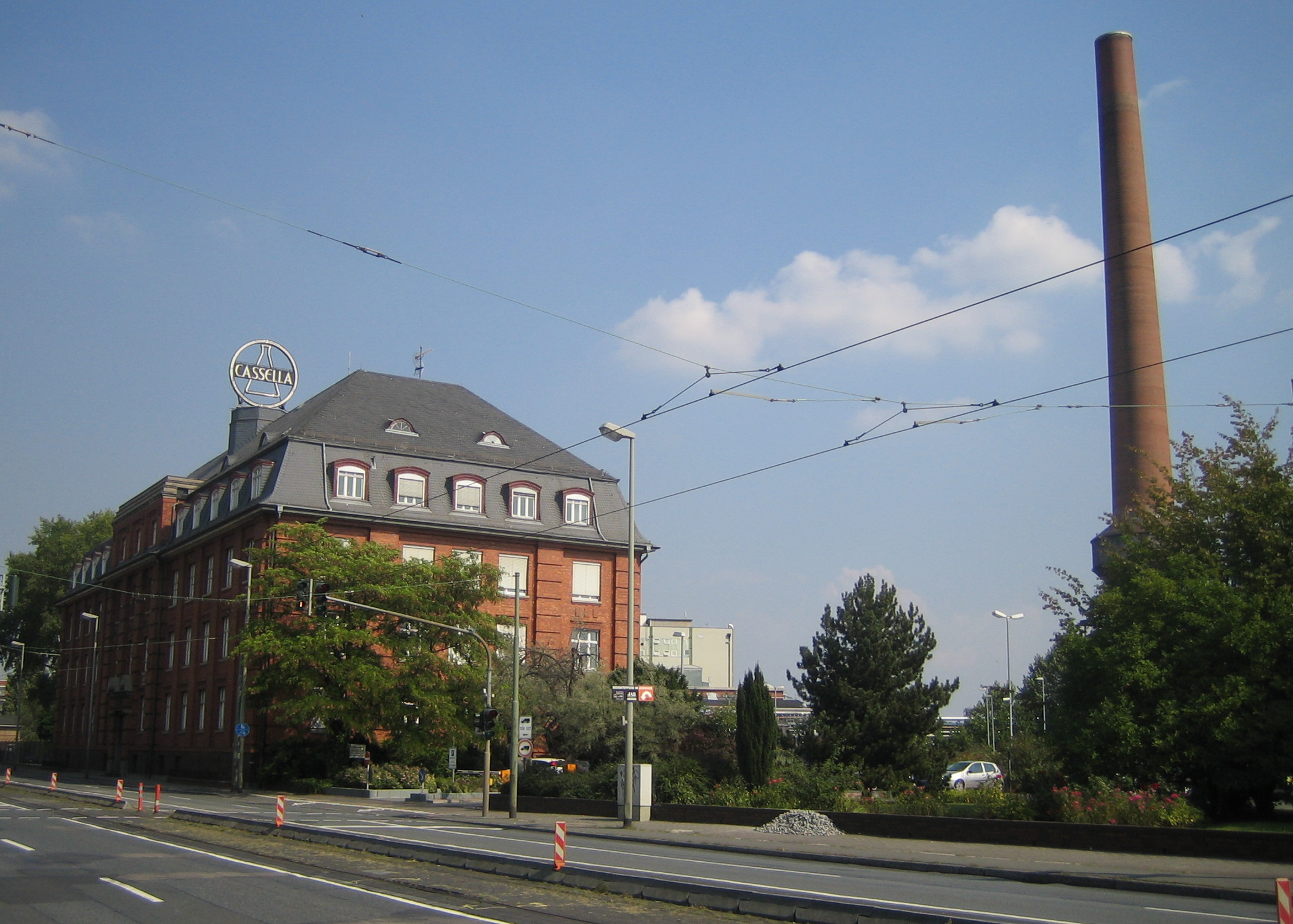 Cassella-Werke